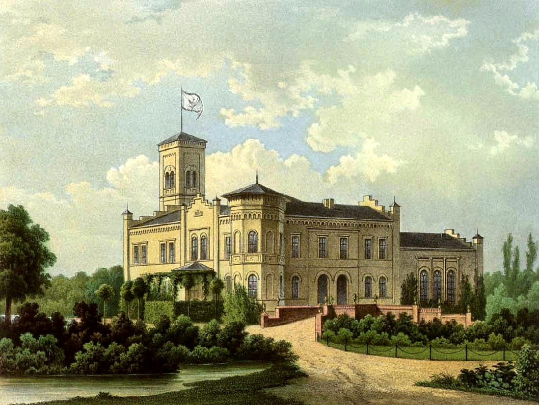 Schloss Melno, Kreis Graudenz, Provinz Preußen Lithografie aus dem 19. Jahrhundert